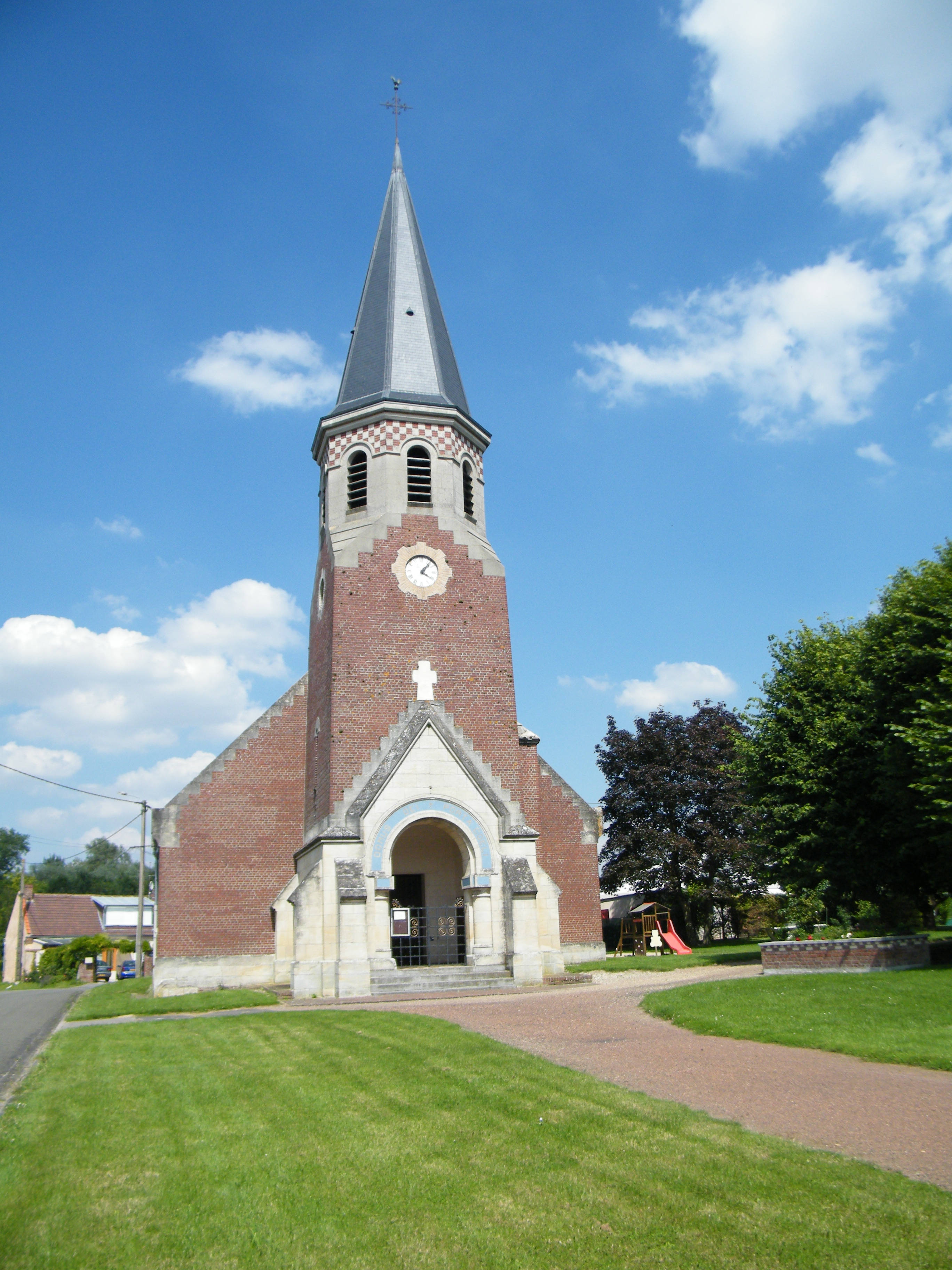 église.